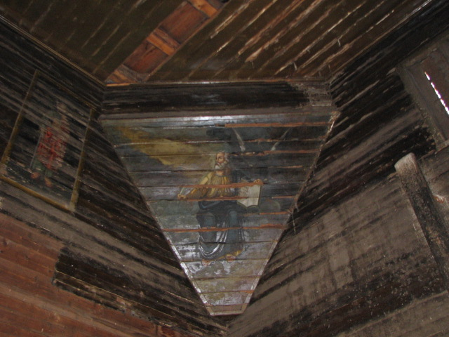 Росписи в церкви св. Параскевы в Барабаново